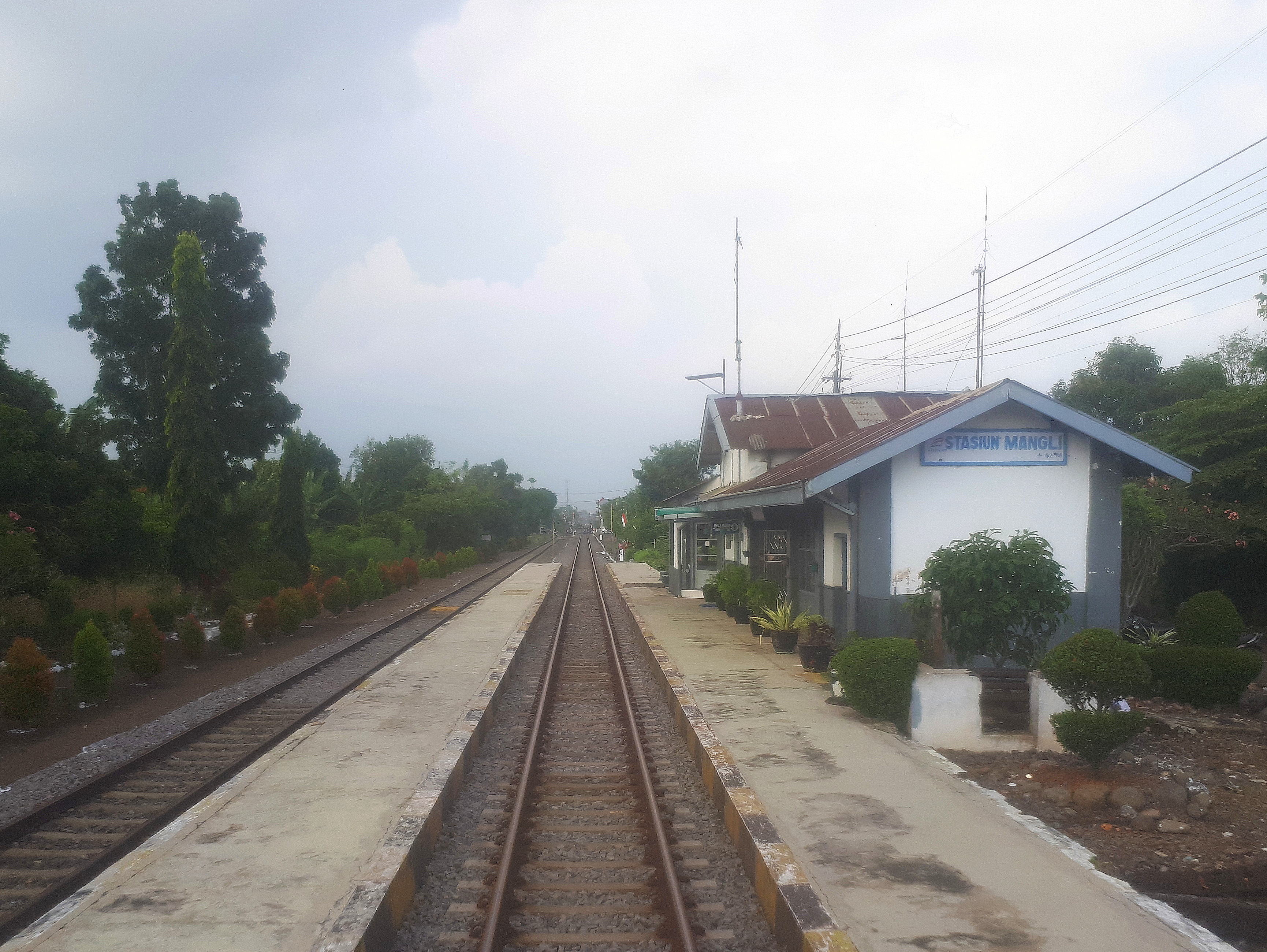 Emplasemen Stasiun Mangli, 2020